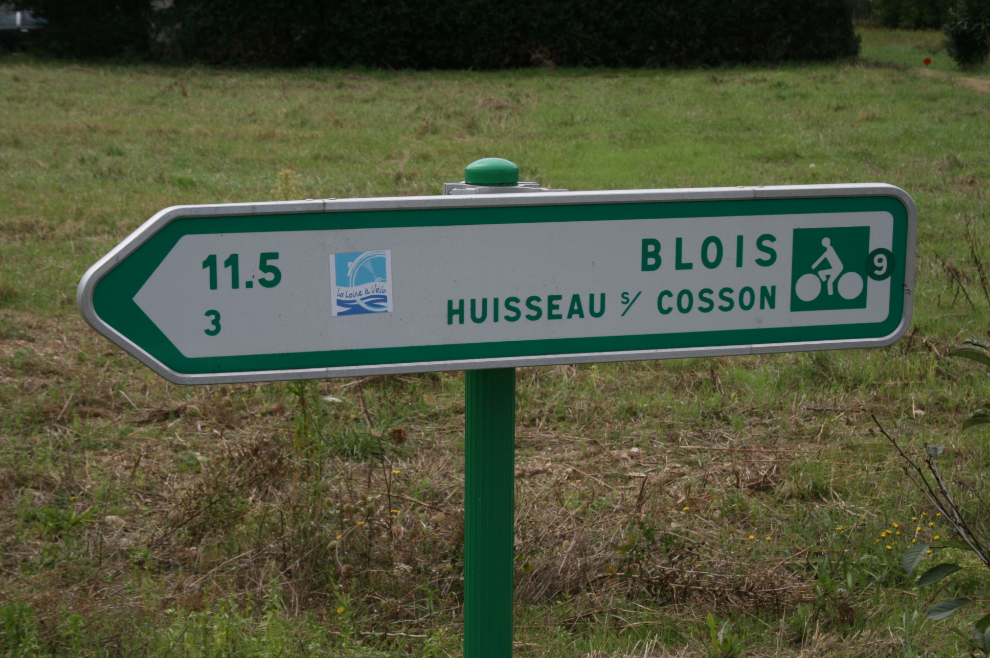 Panneau de jalonneemnt cyclable (France)